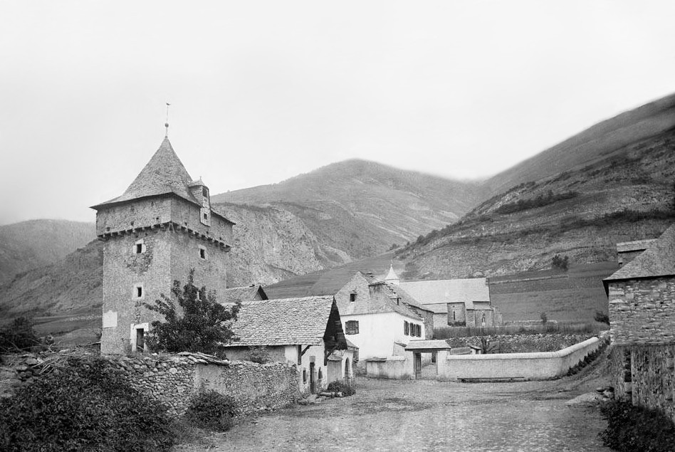 Imatge